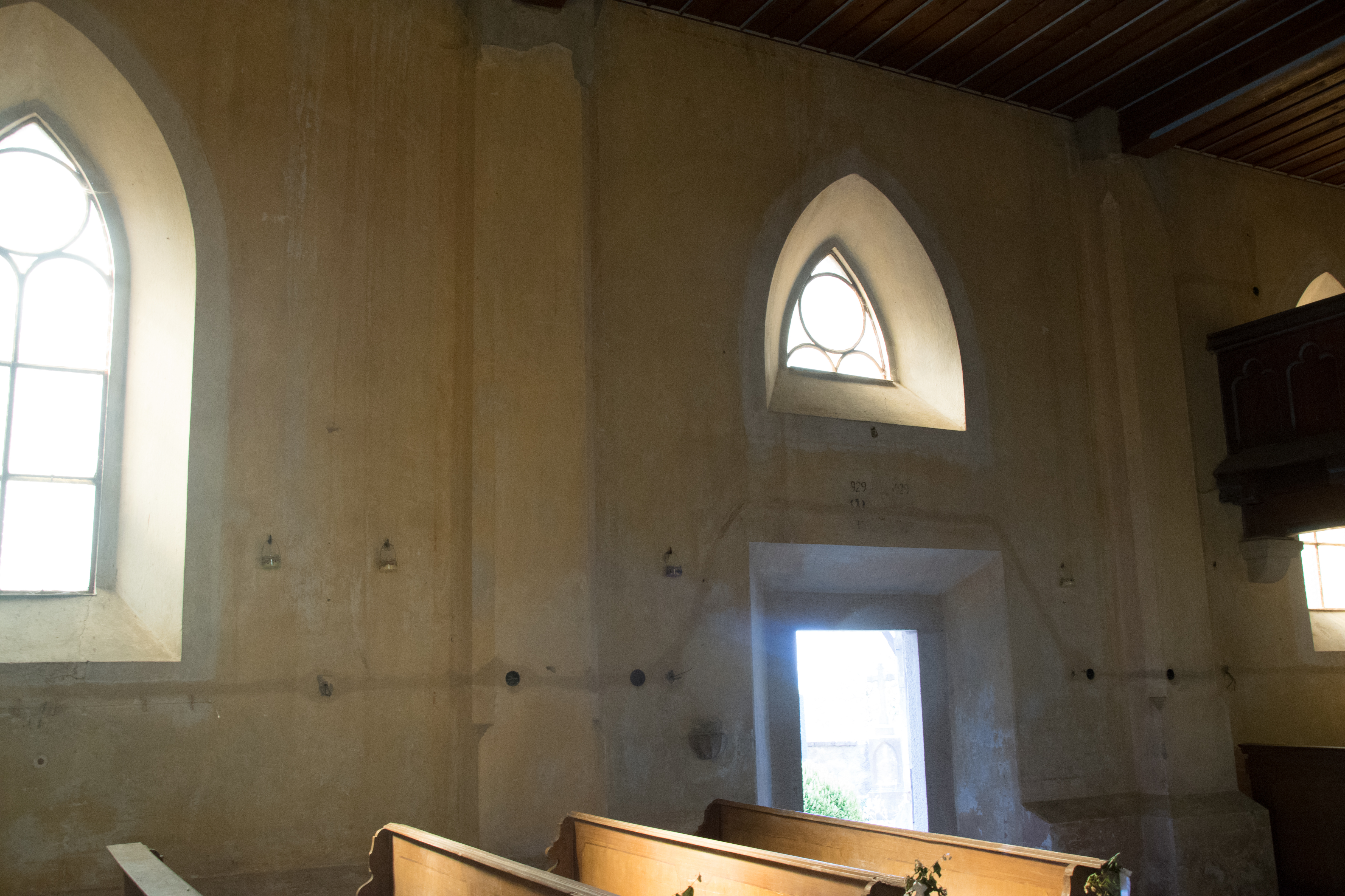 interiér kostela, pohled na jižní vstup, nad ním nástěnné malby zobrazující letopočet